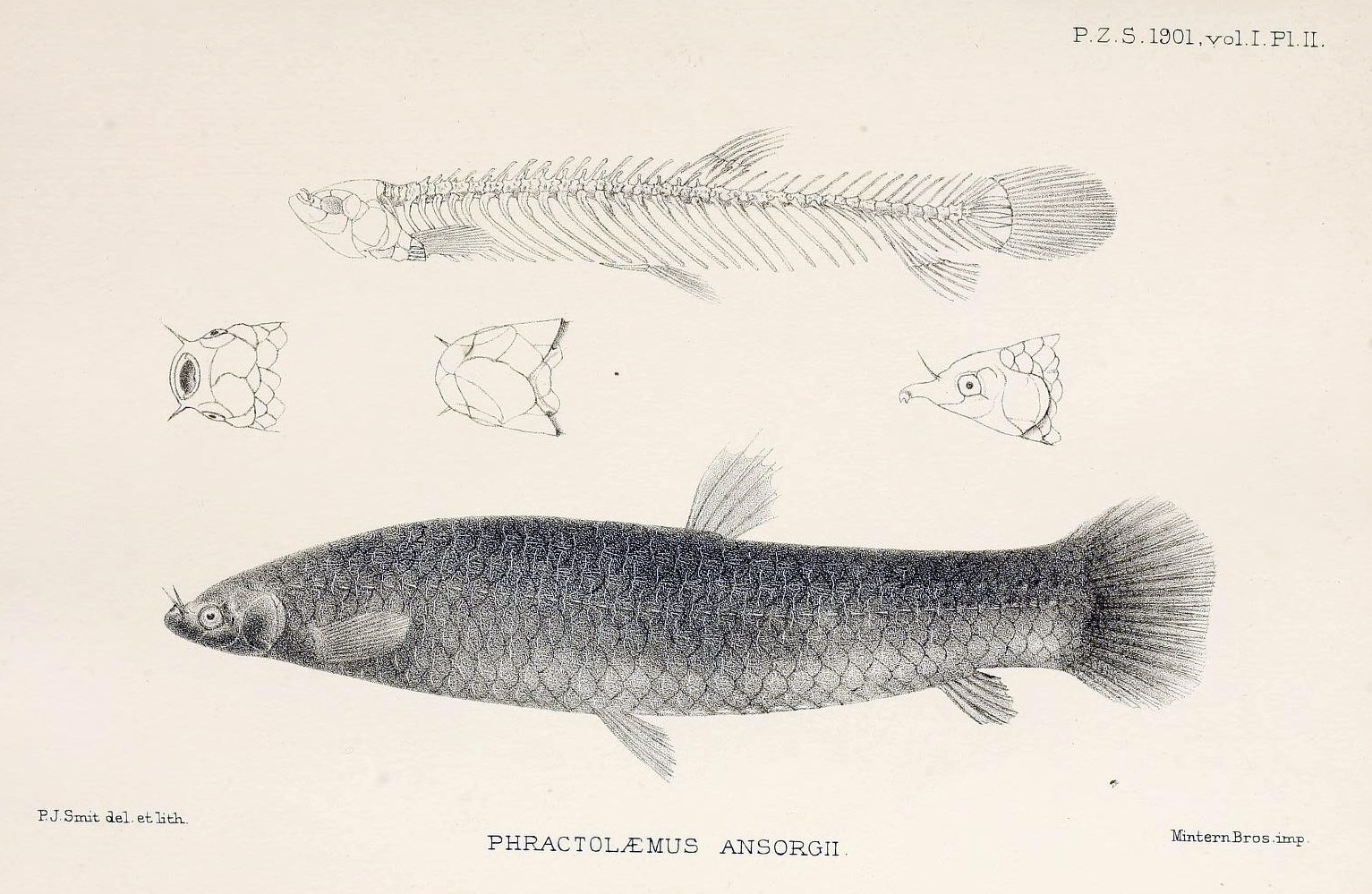 Afrikanische Schlammfisch (Phractolaemus ansorgii)